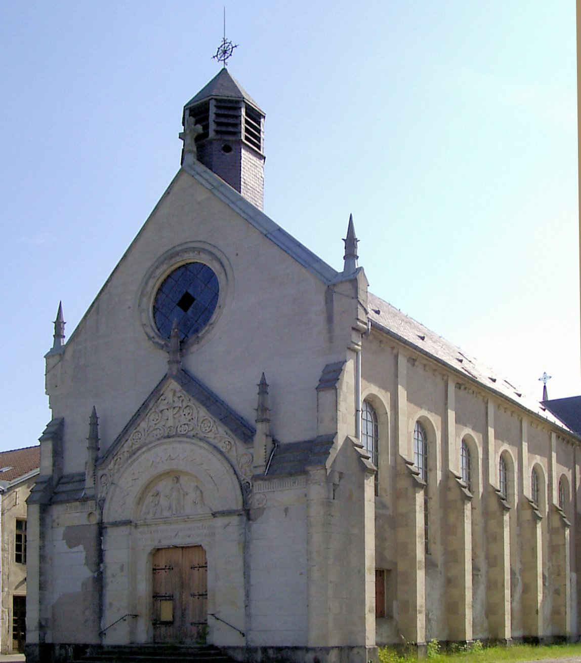 Chapelle de l'hôpital à Zainvillers, commune Vagney